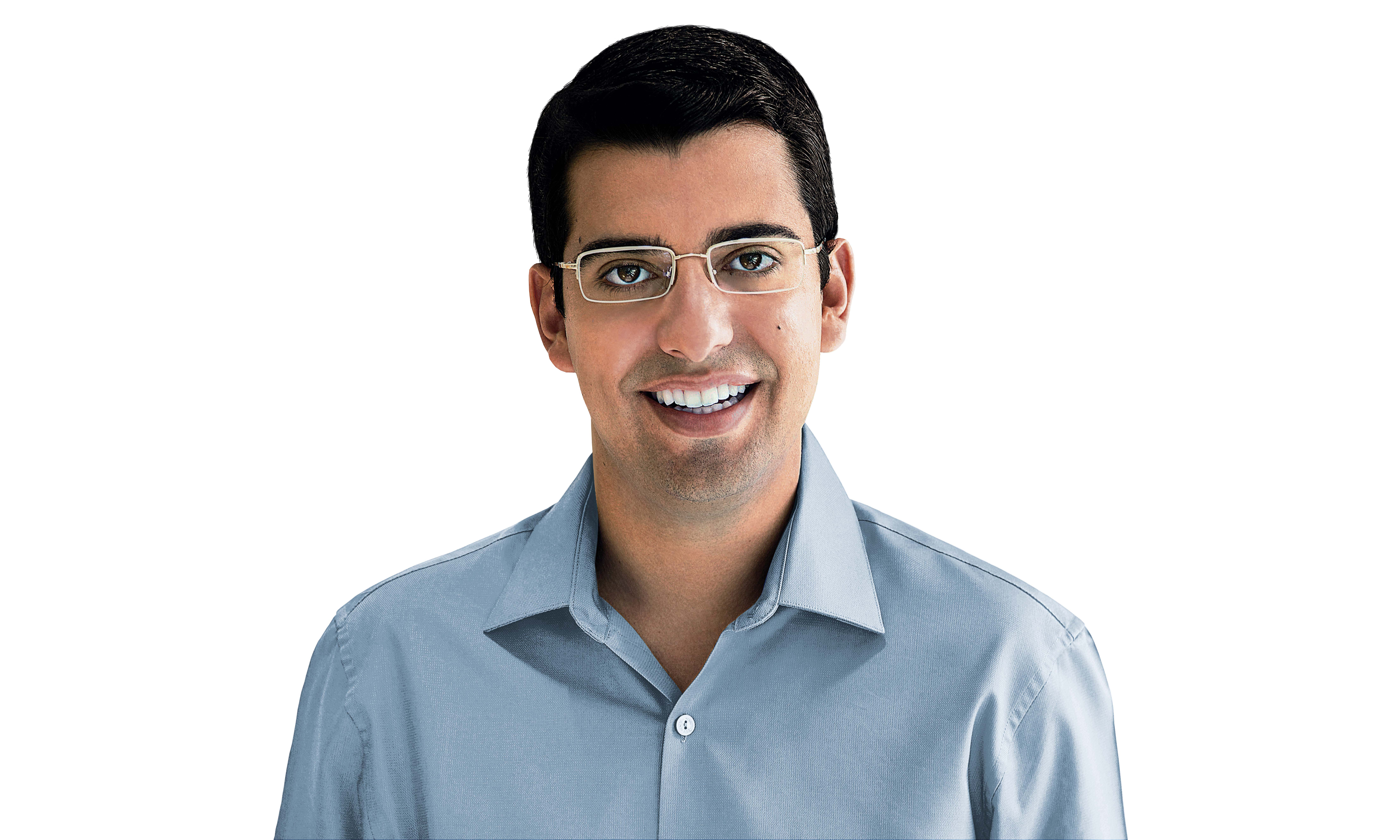 Foto Oficial